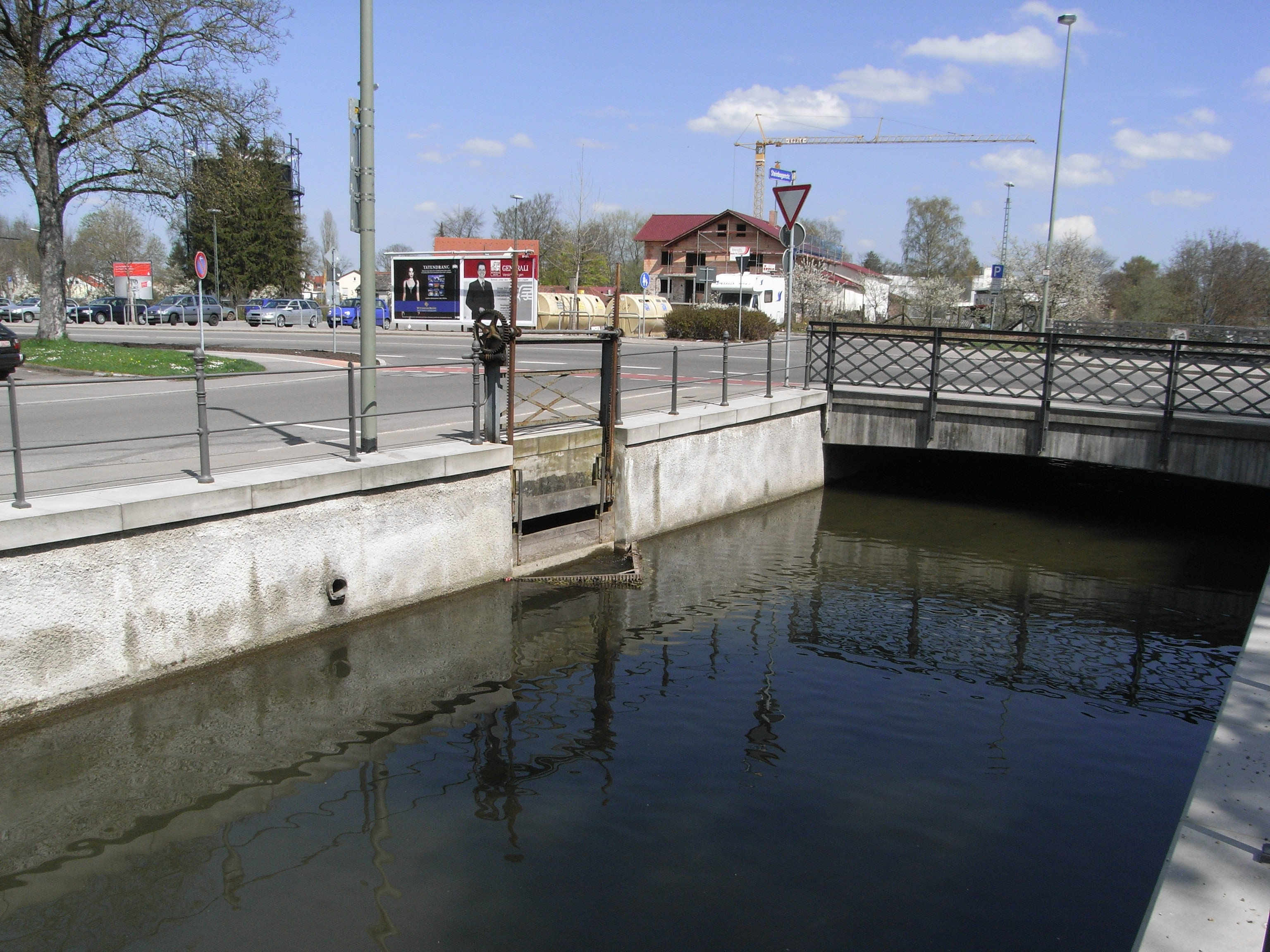 Der Rest der einstmaligen stolzen Memminger Wasserkunst. Hier wurden drei Wasserläufe übereinandergeleitet (Der Wassergraben, die Memminger Aach, der Wegbach)